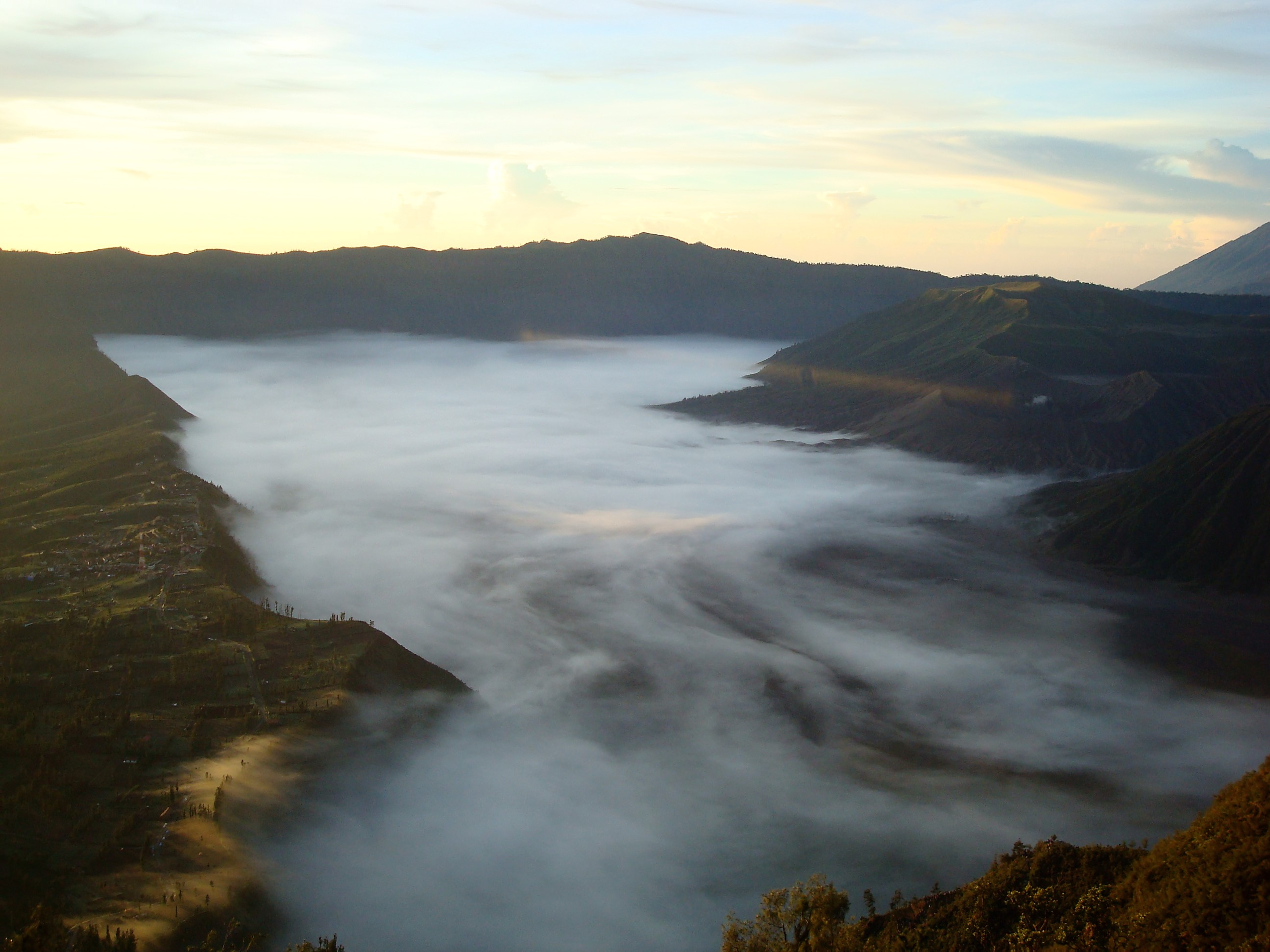 Frühnebel in der Tenngger-Caldera mit Bromo (rechts)